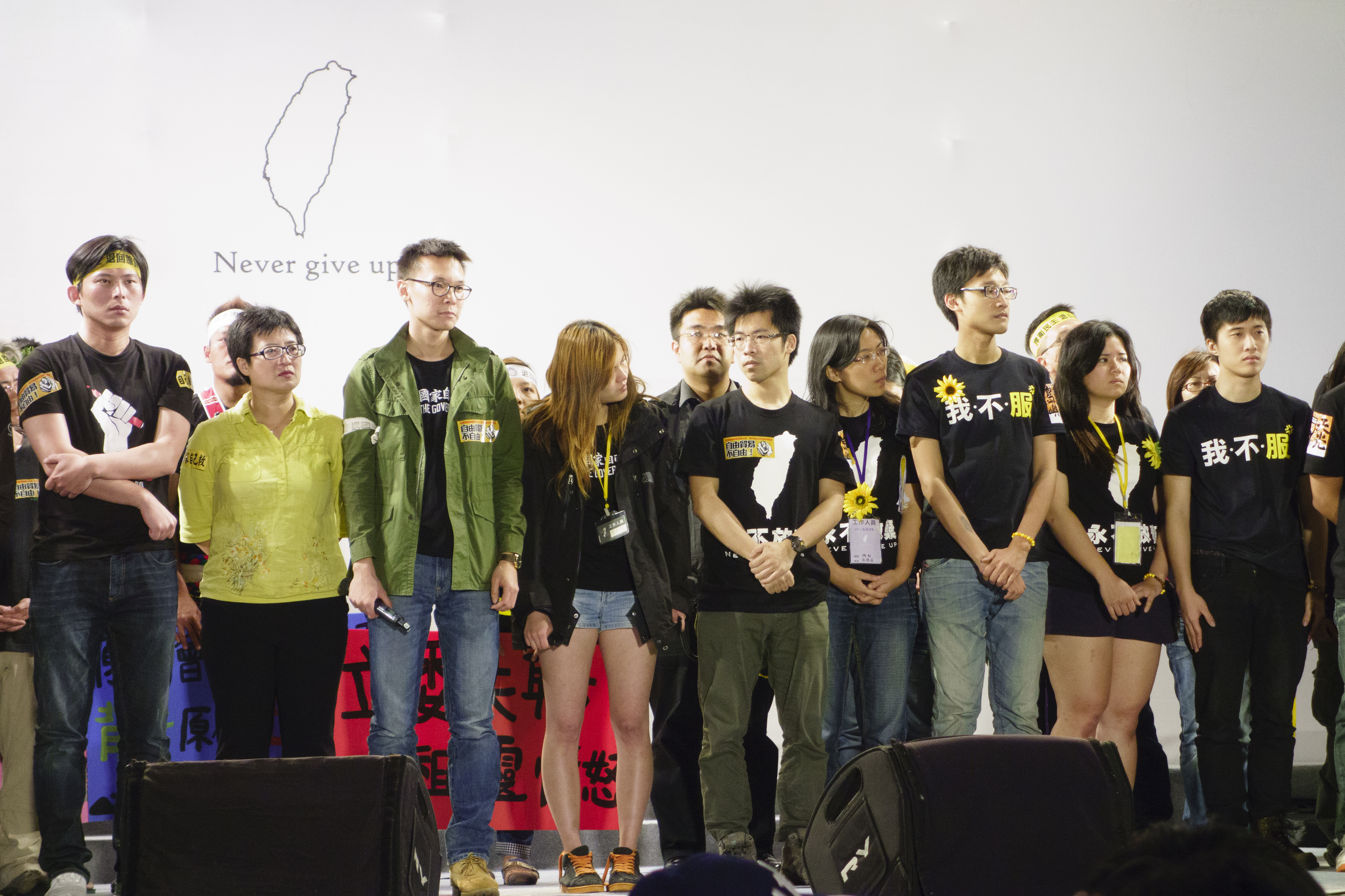 2014 太陽花學運